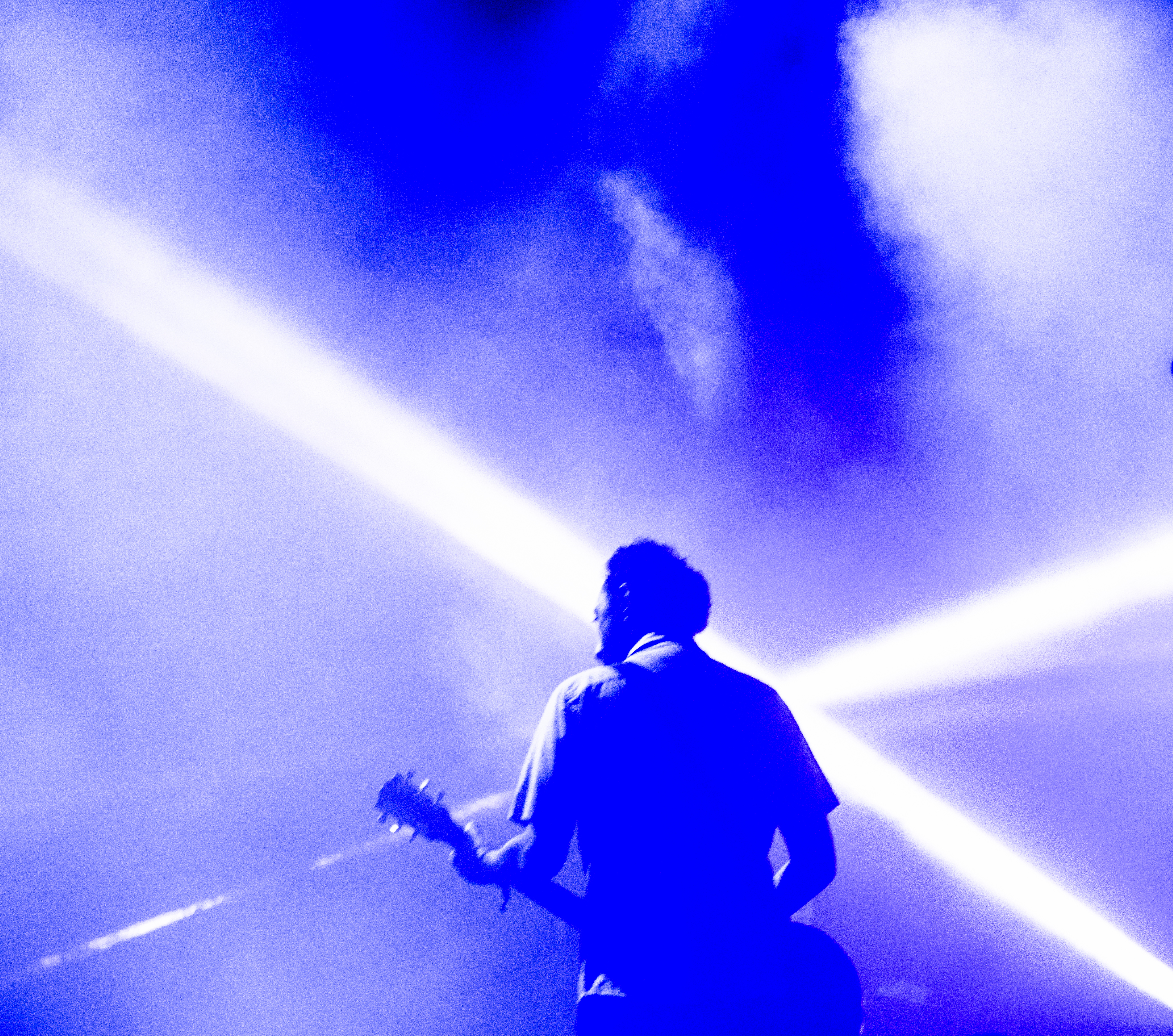 FIB 2015